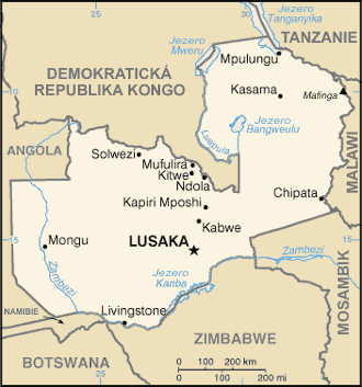 Mapa Zambie - přeložená mapa z CIA World Factbook.